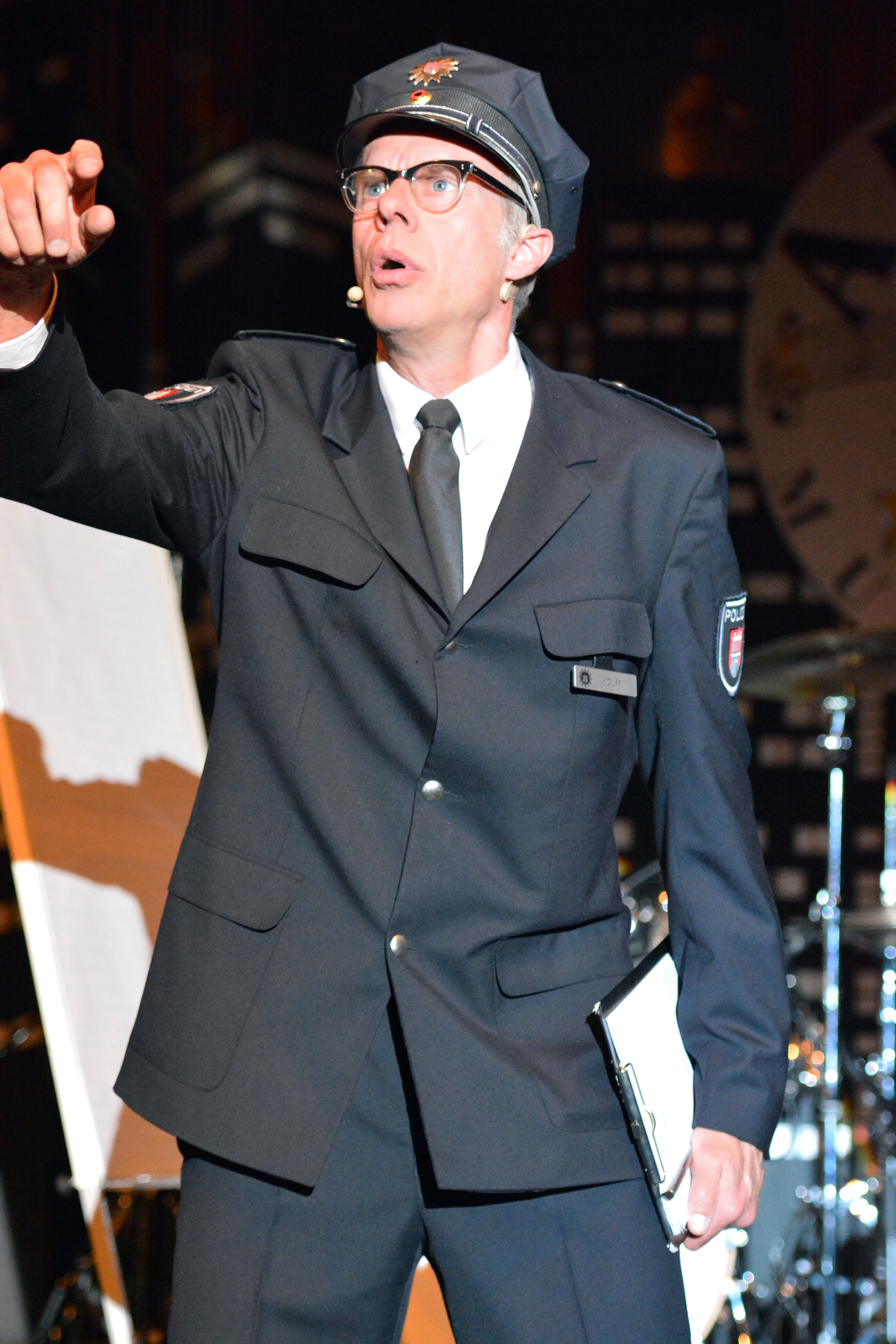 Dirk Bielefeldt alias Herr Holm bei Appen musiziert 2014